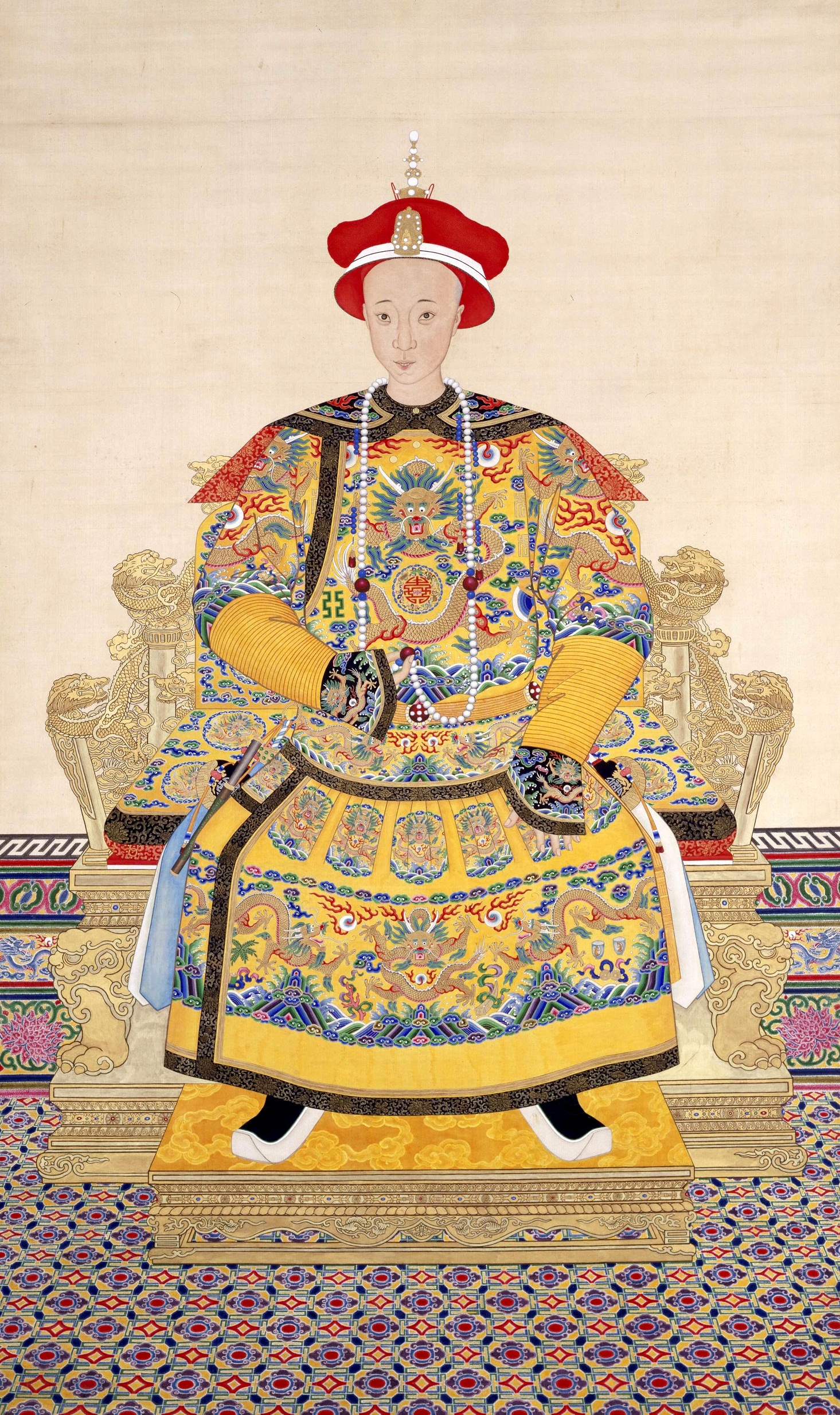 《清穆宗同治皇帝朝服像》